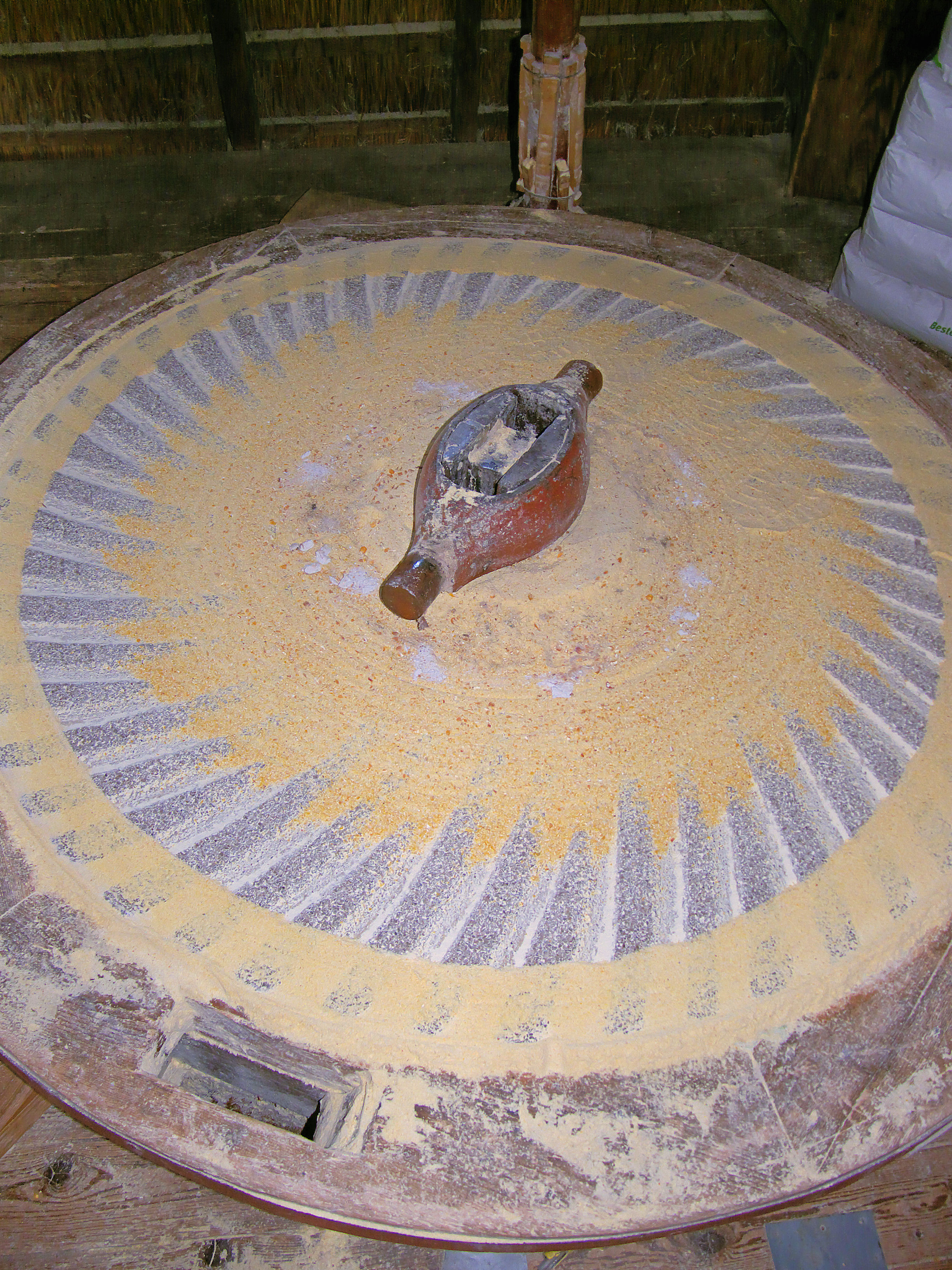 Maalbeeld kunstkoppel